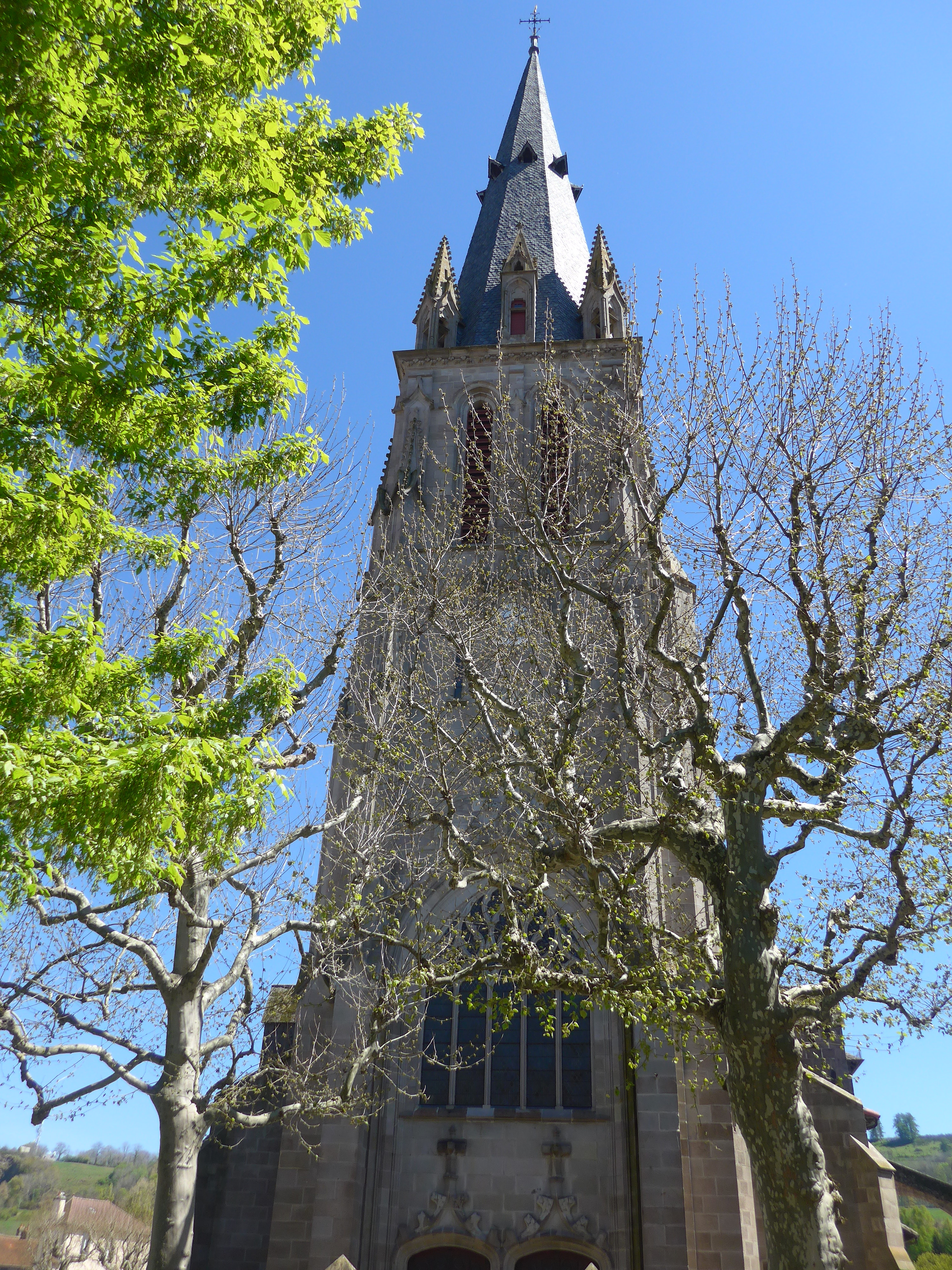 Église abbatiale, à l'intérieur on remarque les orgues, à l'exterieur on remarque la nécropole. .